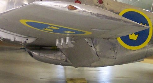 Wölbklappe einer North American P-51